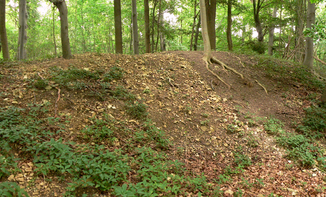 Ringwall auf dem Gehrdener Berg, steiniger Bereich als Grabungsstelle von 2013, wieder zugeschüttet